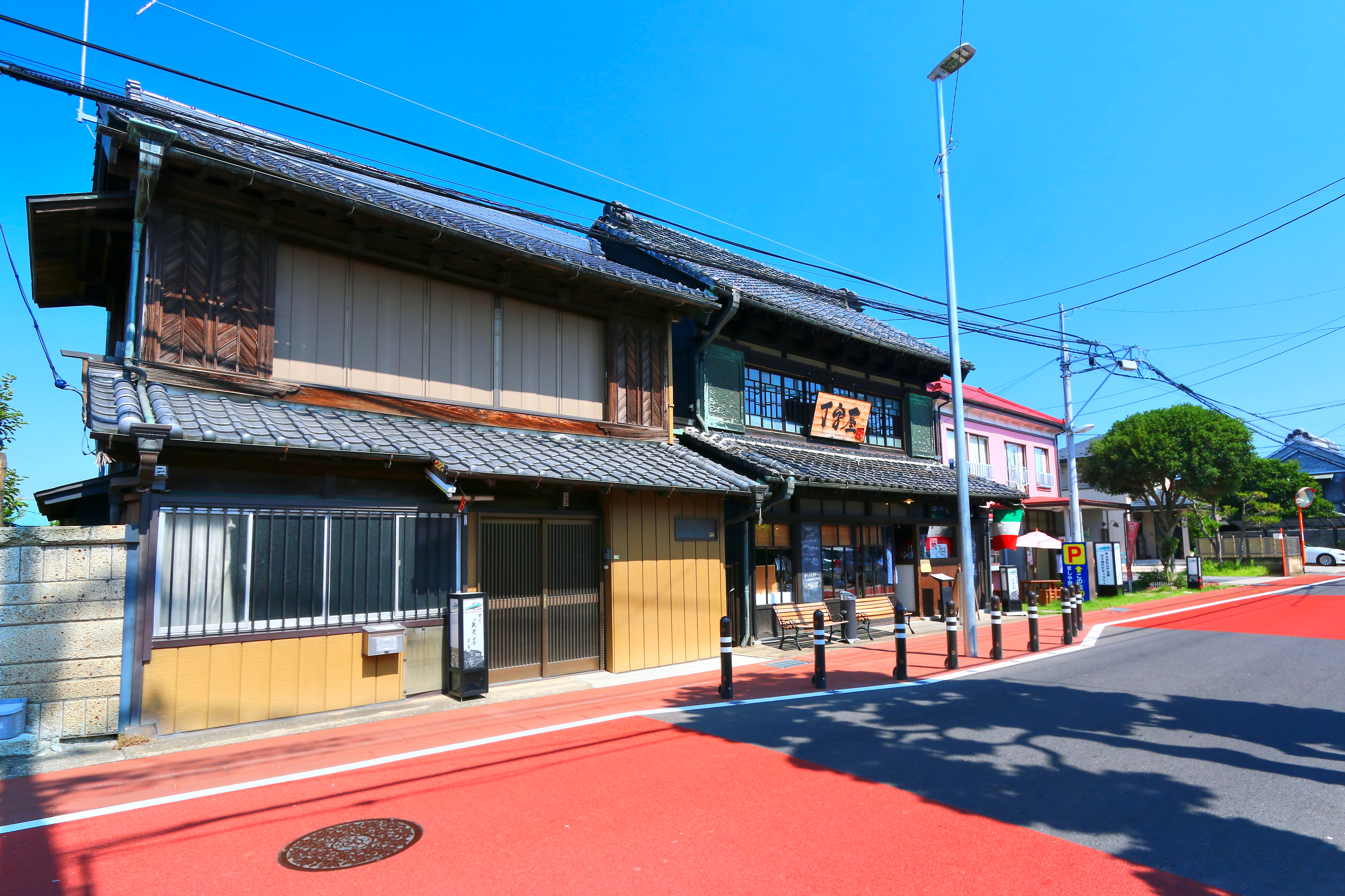 イタリアンレストラン丁字屋